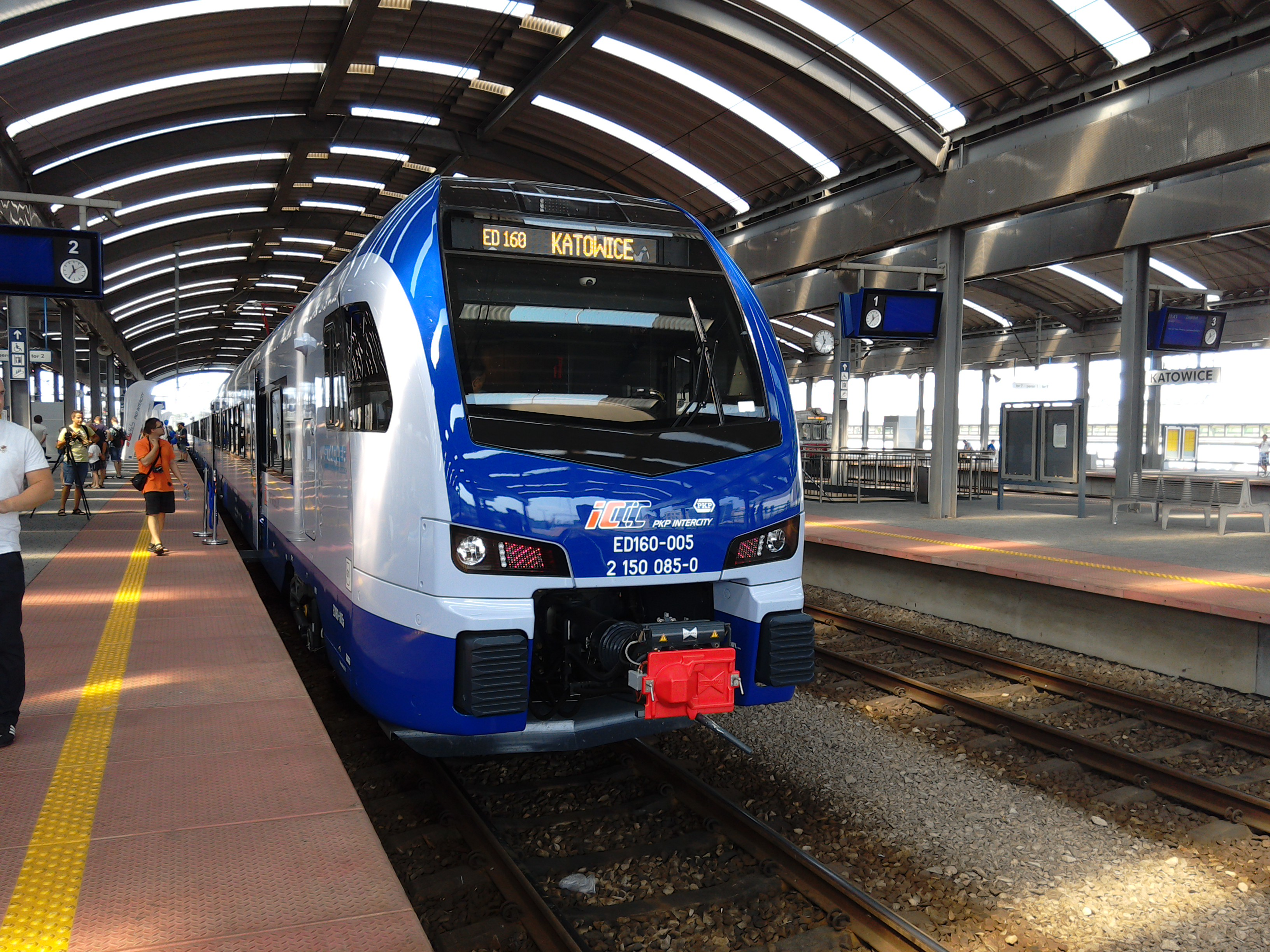 Pokaz pociągu FLIRT3 w Katowicach